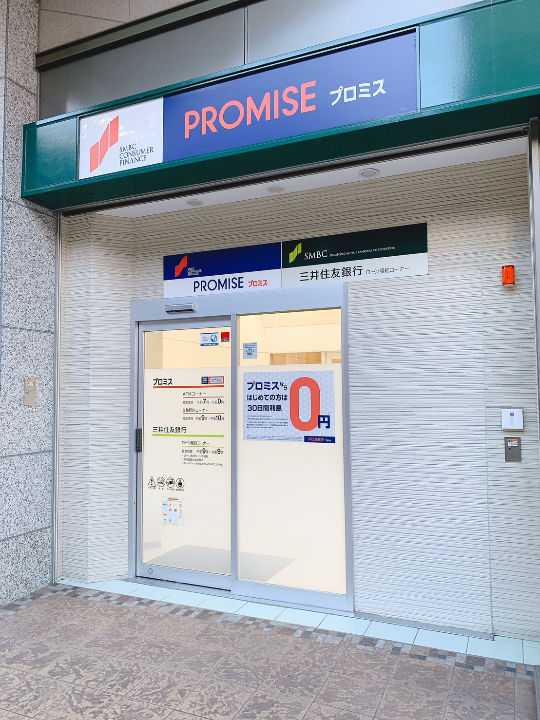 プロミス ＪＲ高槻アクトアモーレ自動契約コーナーの写真